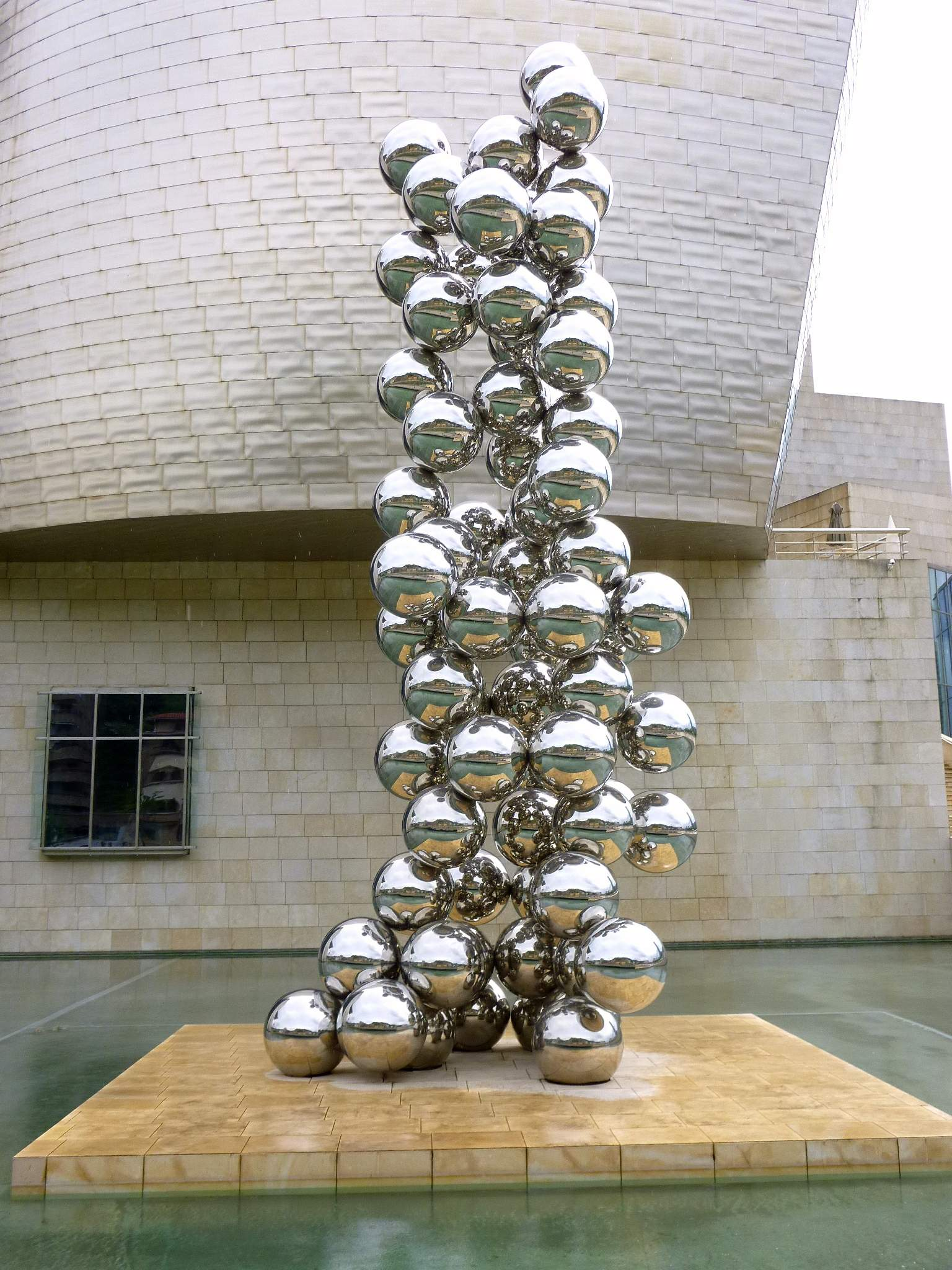 'Tall Tree and the Eye' (de Anish Kapoor), en el Museo Guggenheim Bilbao